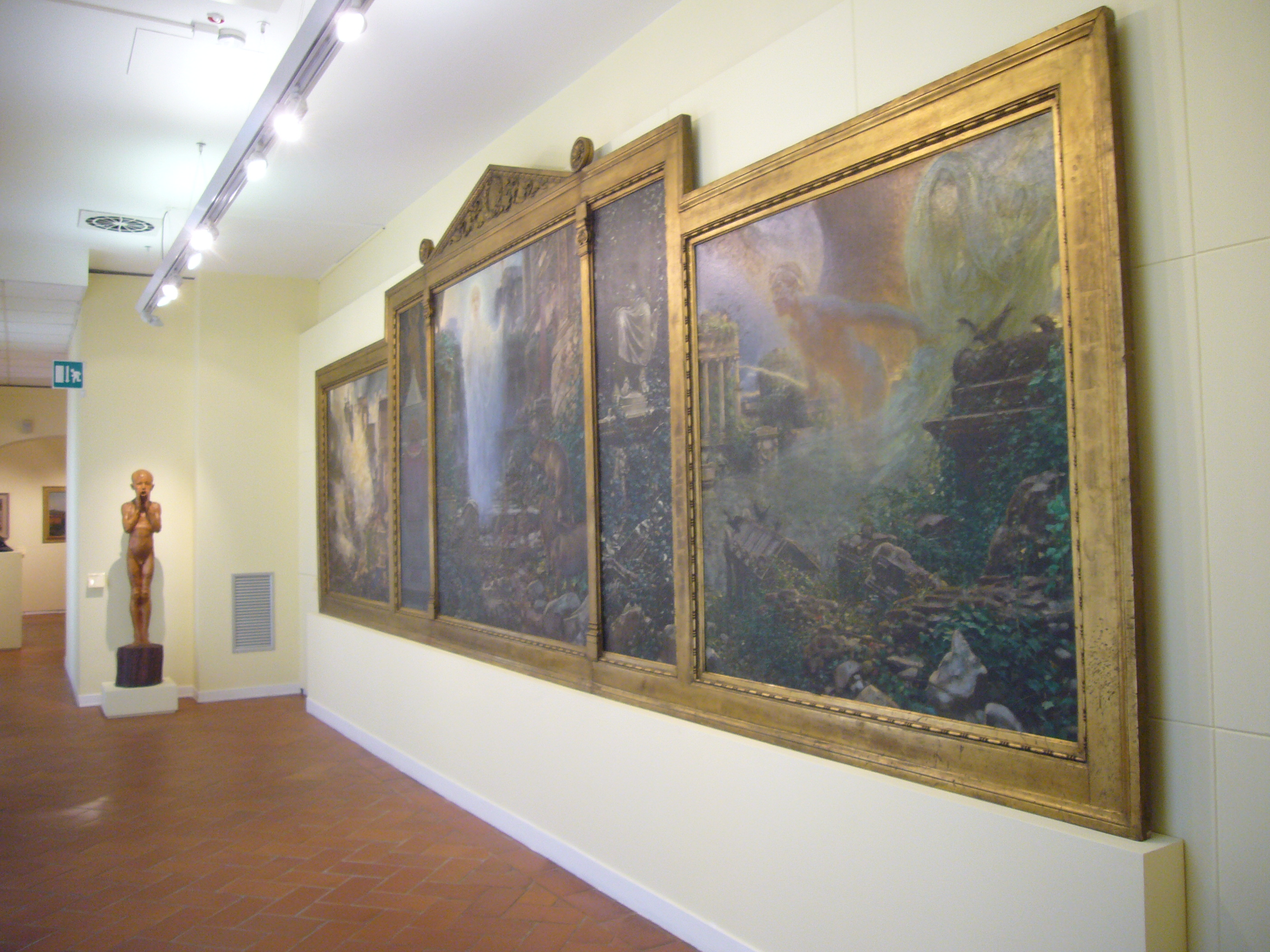 Roma, Galleria d'arte moderna di Roma Capitale, il polittico "Sic transit" di Adolf Hirémy-Hirschl